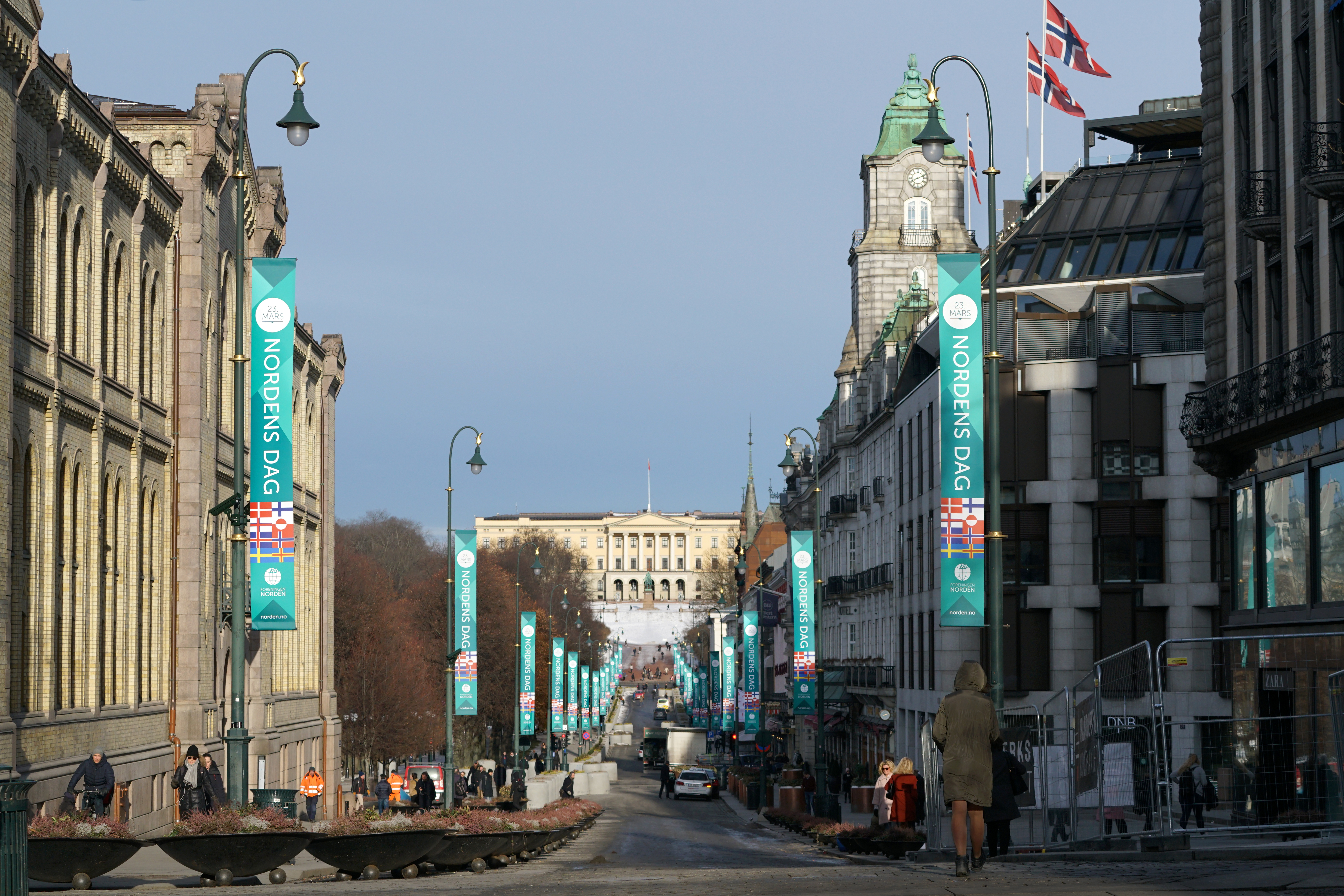 Foreningen Norden feirer Nordens dag 23. mars med bannere langs Karl Johans gate i Oslo.